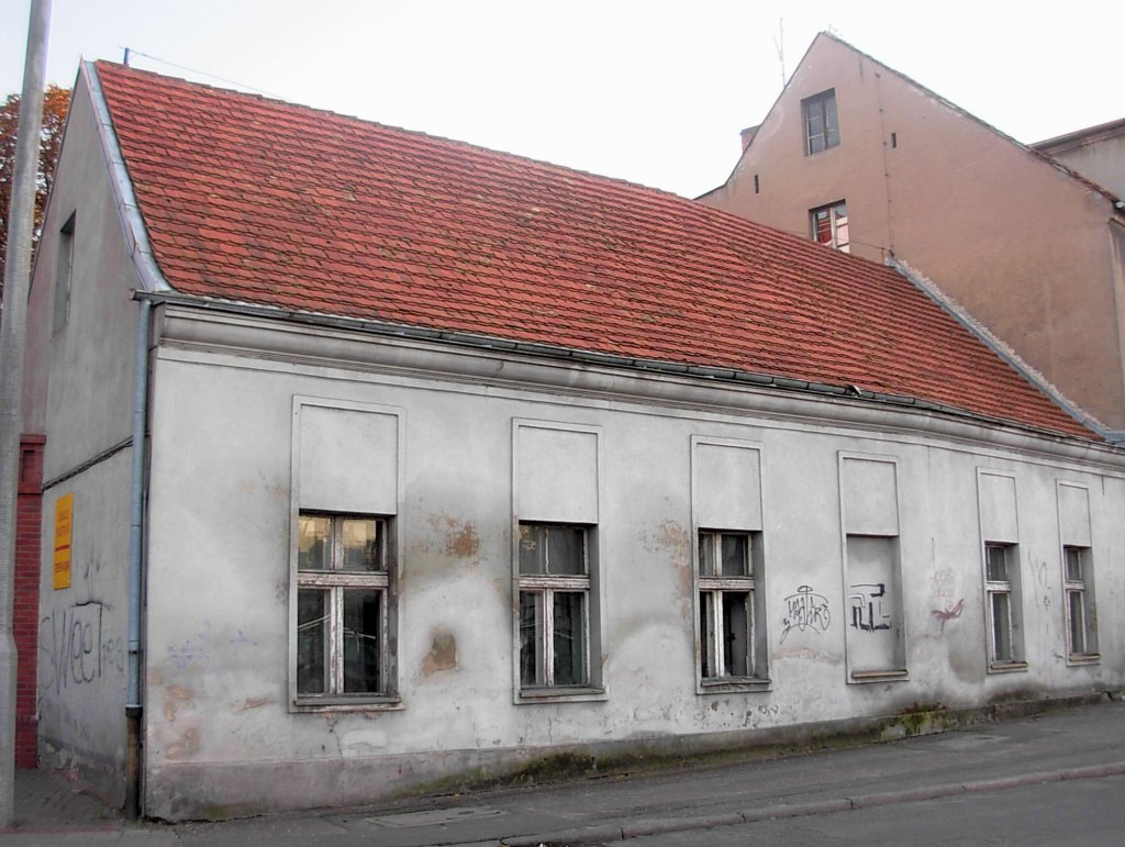 Dom Grodzka 14-16 Bydgoszcz